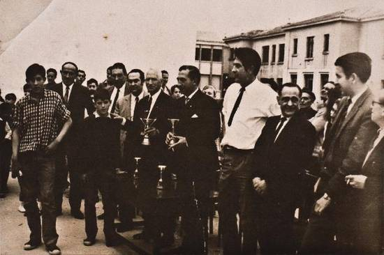 Autoridades en un reparto de trofeos en el frontón, todavía sin cubierta, y al fondo las Escuelas Nacionales. Ambas obras serán finalizadas en los años 50.